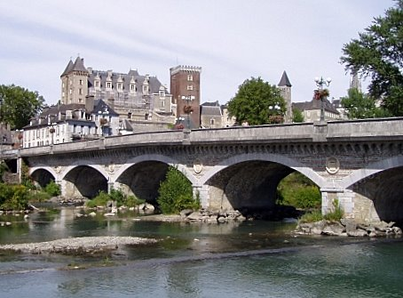 Le château de Pau, vu des berges du Gave de Pau, au pied du pont du 14 juillet.